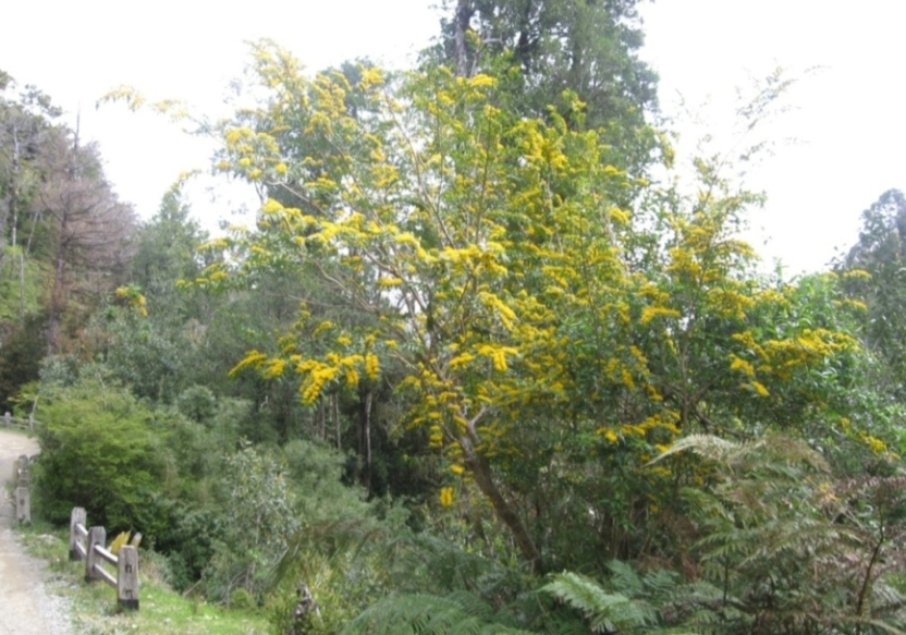 Plánta de Azara lanceolata, parque Oncol, Valdivia, Chile